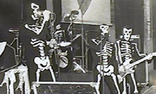 Los Brujos durante su Gira Caníbal, principios de los años 90